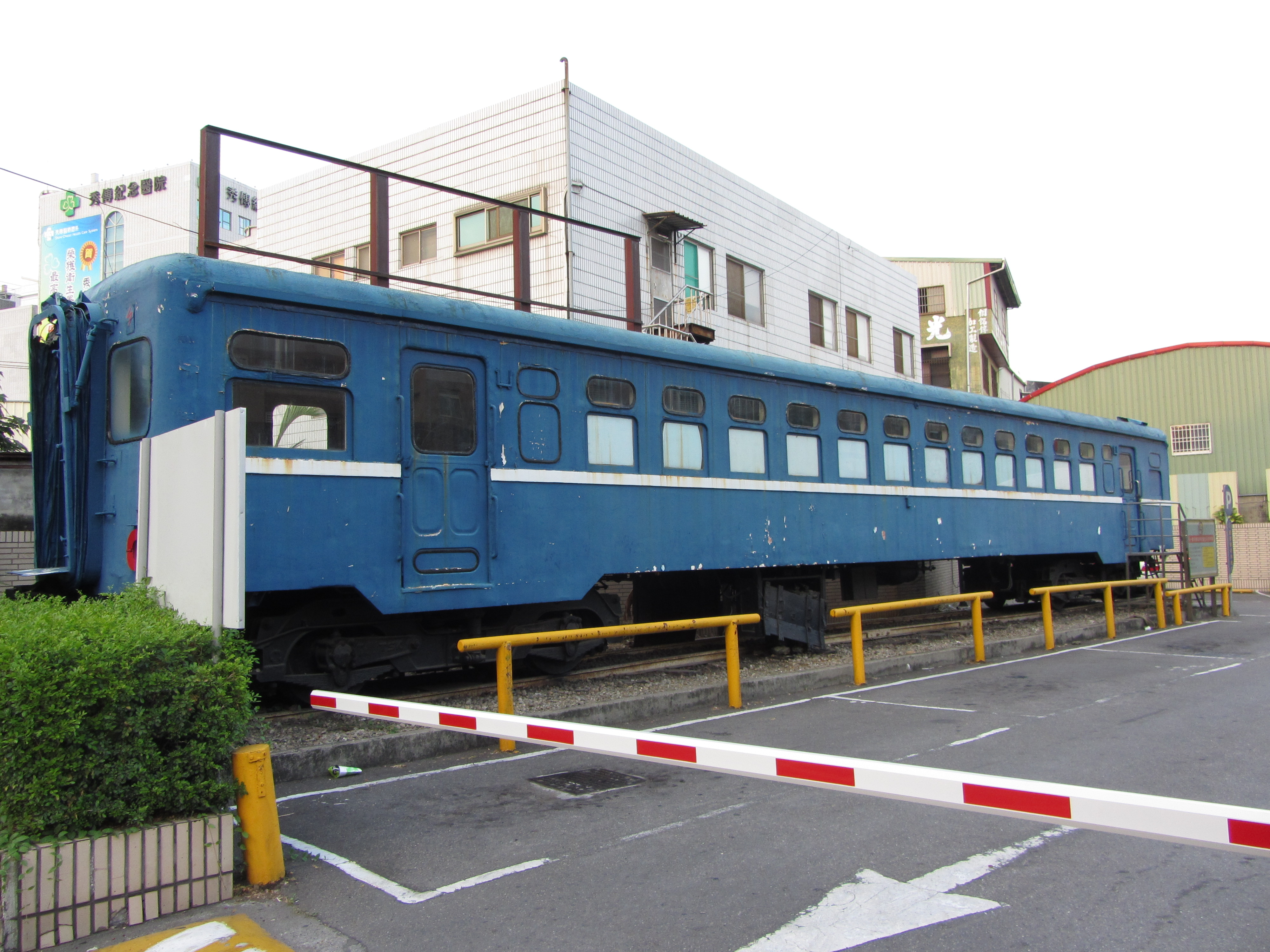 台灣彰化縣彰化市中山路上麥當勞的DR2652台鐵飛快車拖車